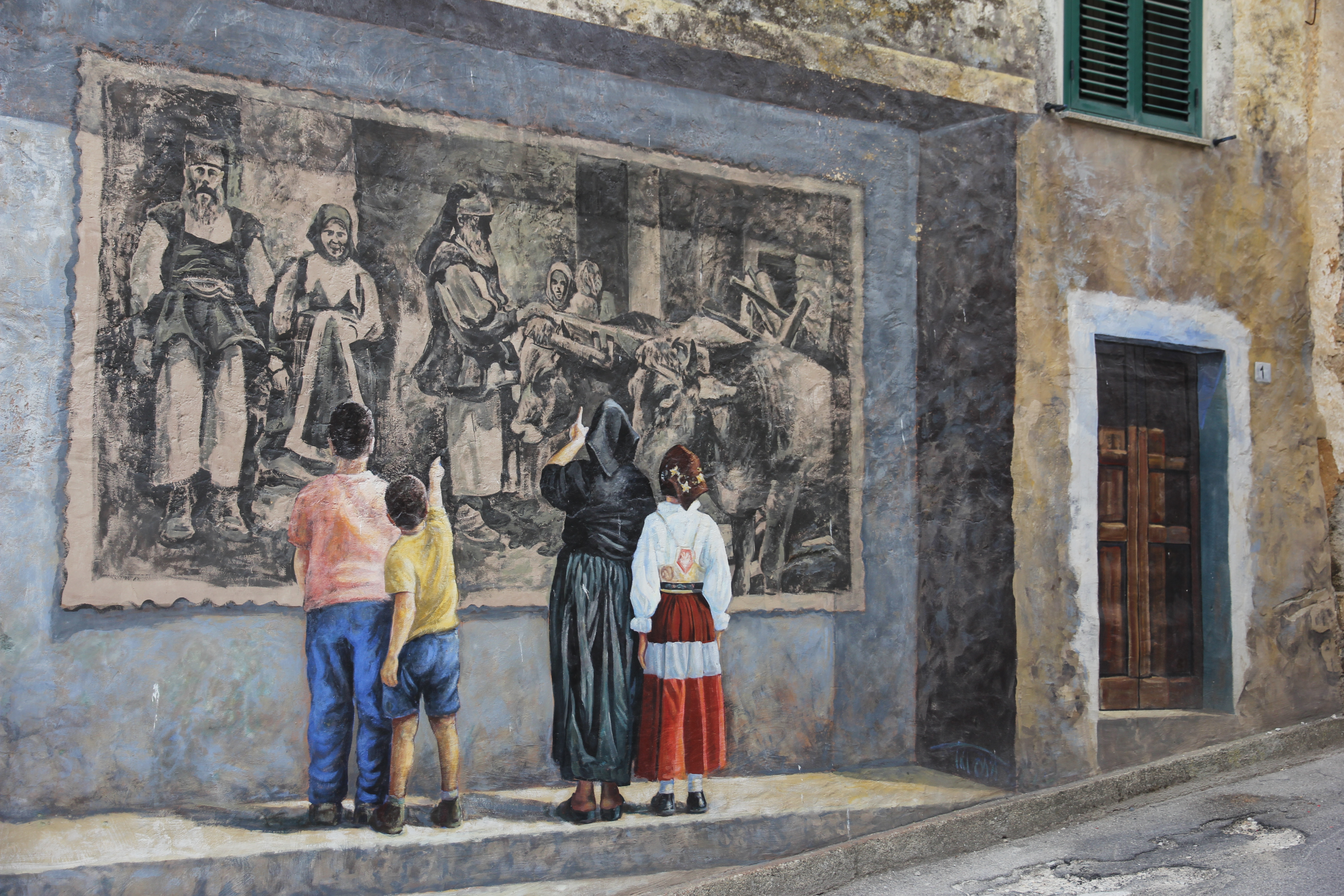 Fonni